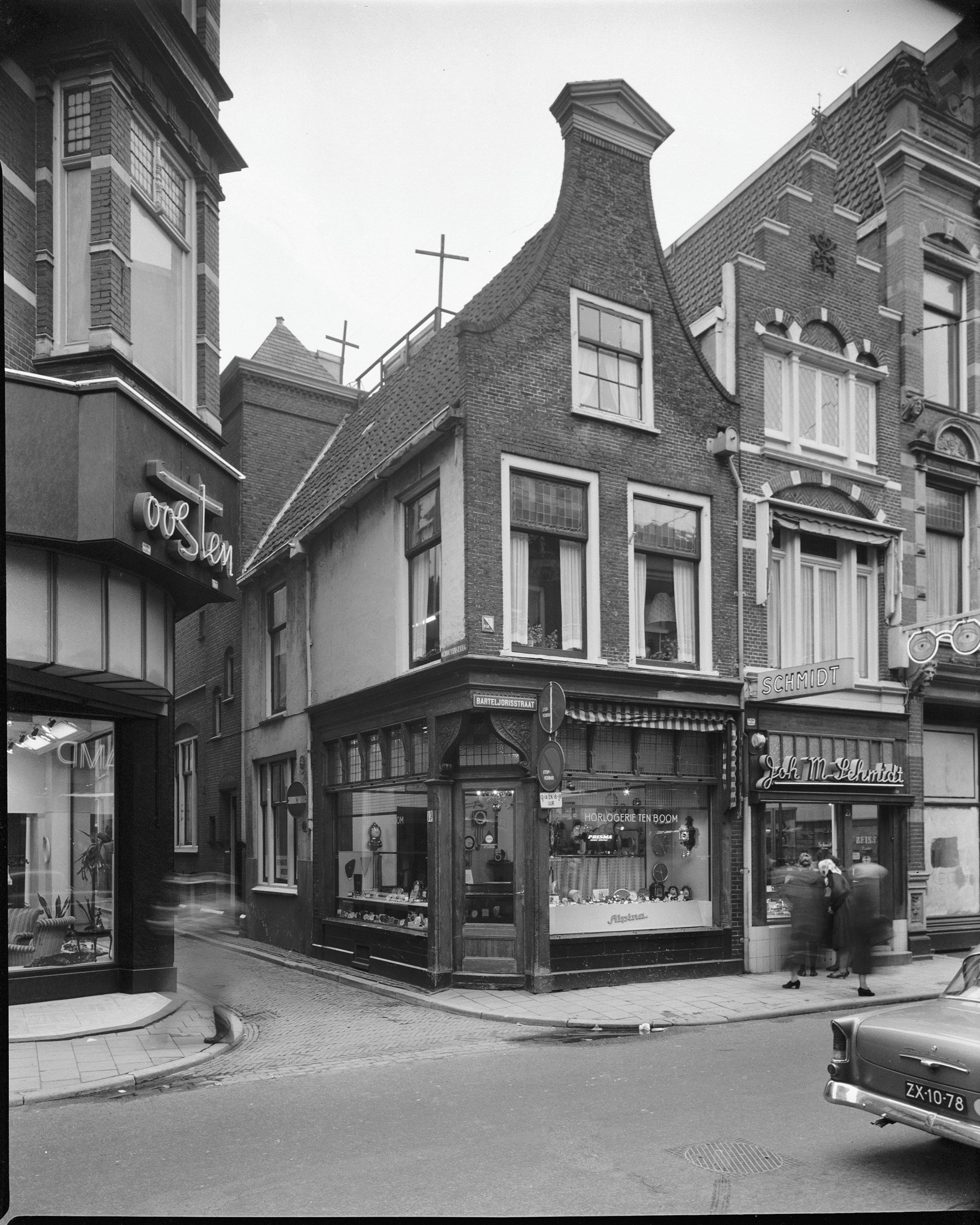 gevel